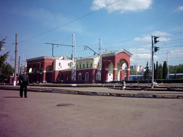 здание Орловского вокзала